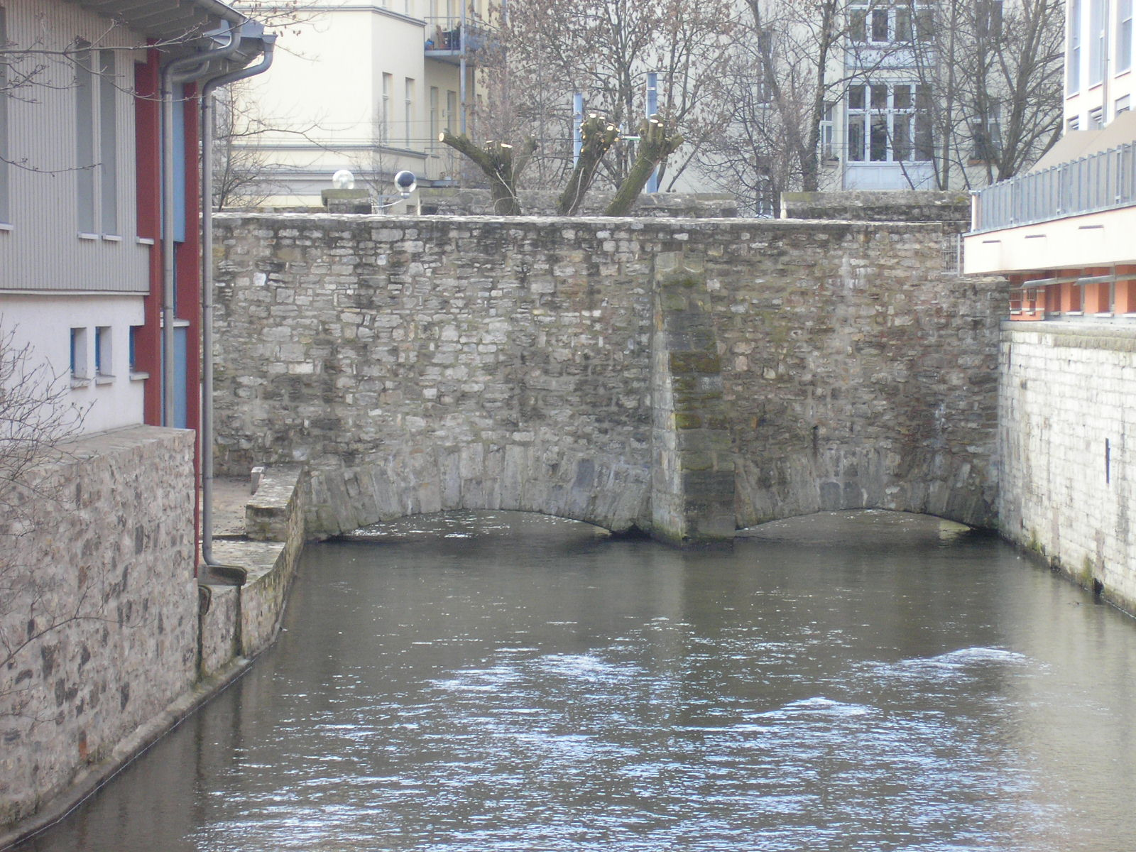 Der Durchlass der inneren Stadtmauer für den Walkstrom in Erfurt (Thüringen).